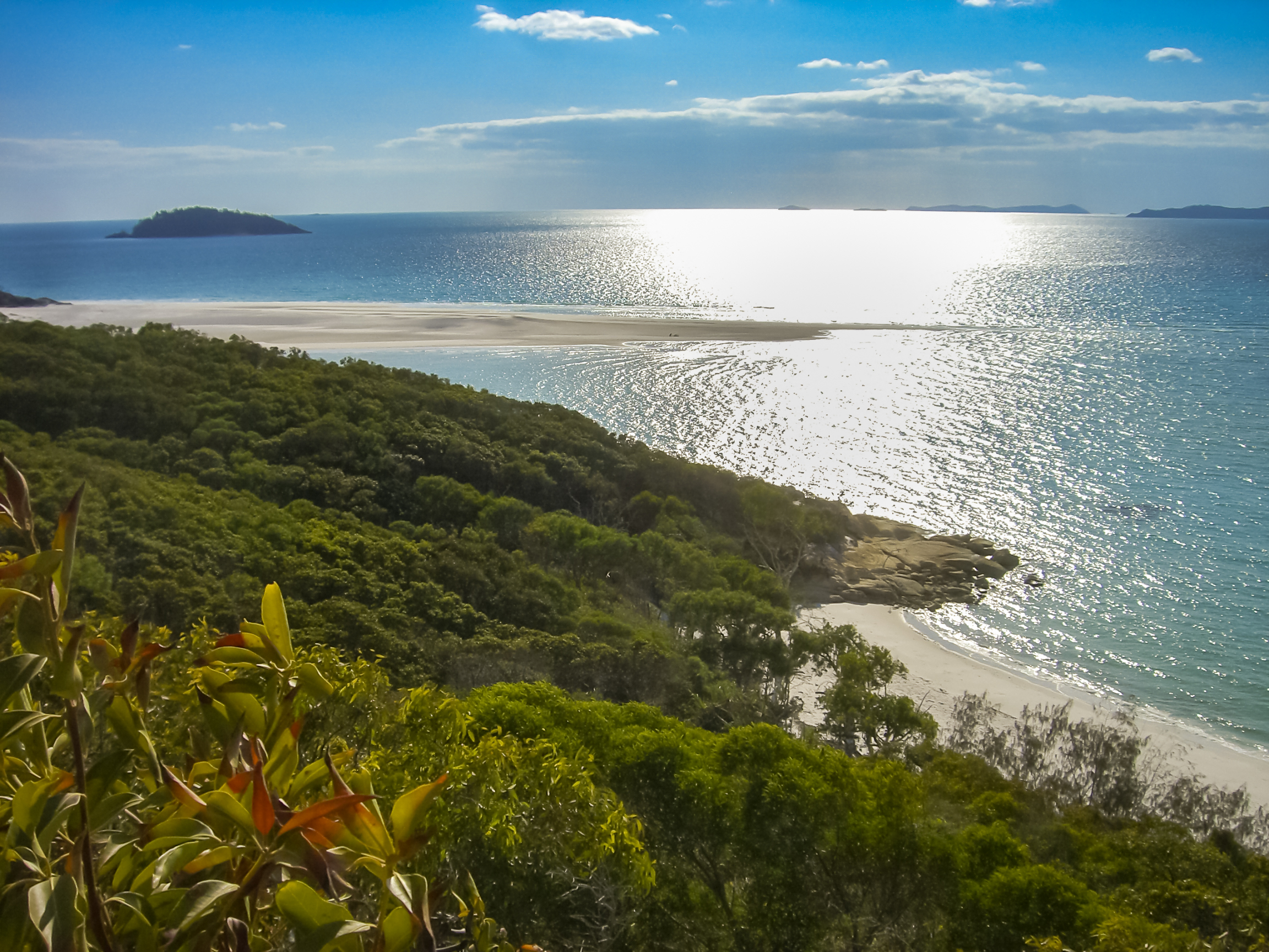 Die Whitsunday Islands sind eine Inselgruppe vor der Ostküste des australischen Bundesstaates Queensland.